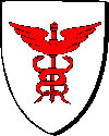 gwialenn-beoc'h; Kaduse